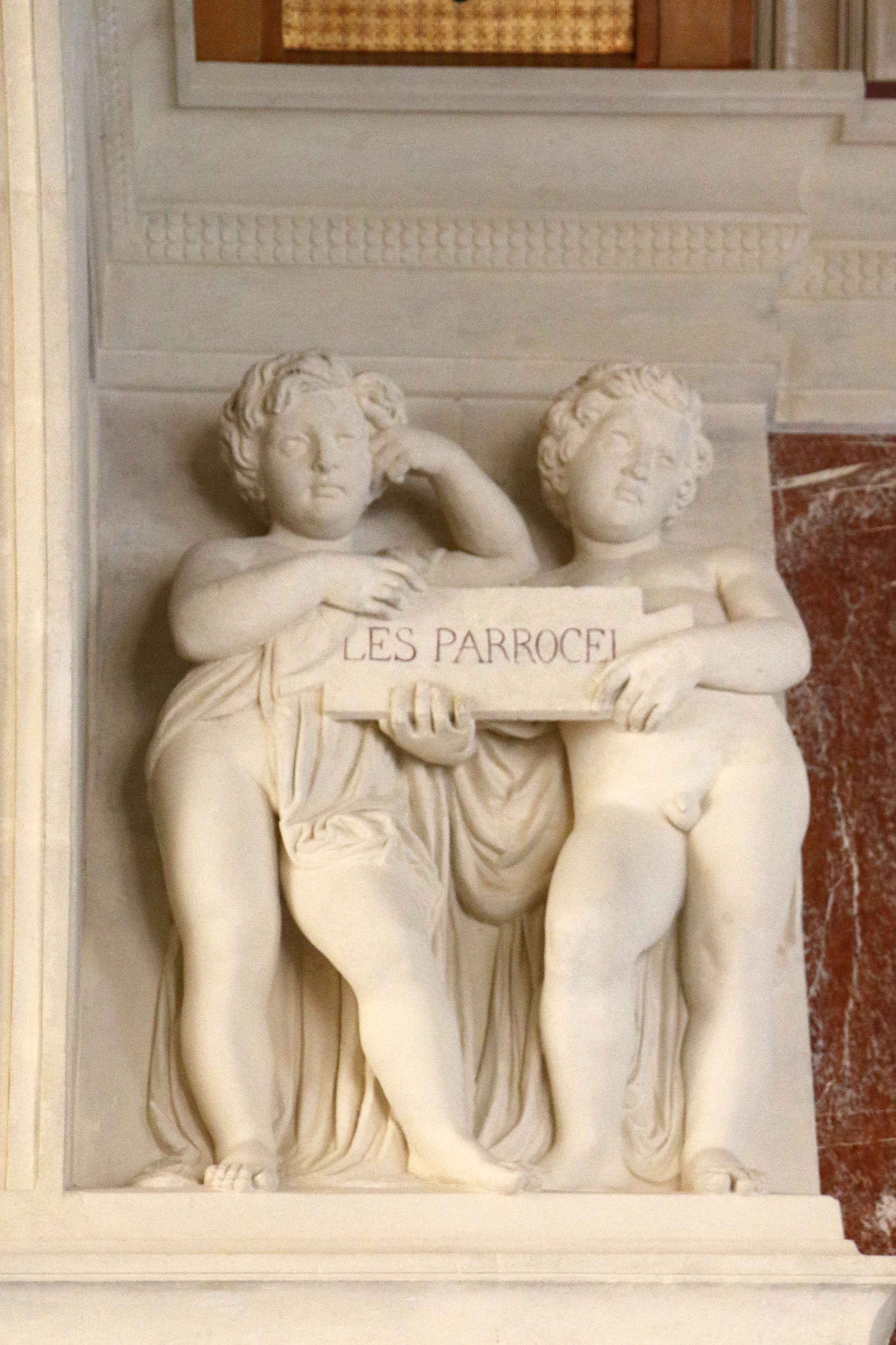 Groupe de deux enfants dans l'escalier d'honneur du Musée des beaux-arts de Marseille (Palais Longchamp) portant la dédicace aux Parrocel. La sculpture a été réalisée par Marius Guindon.